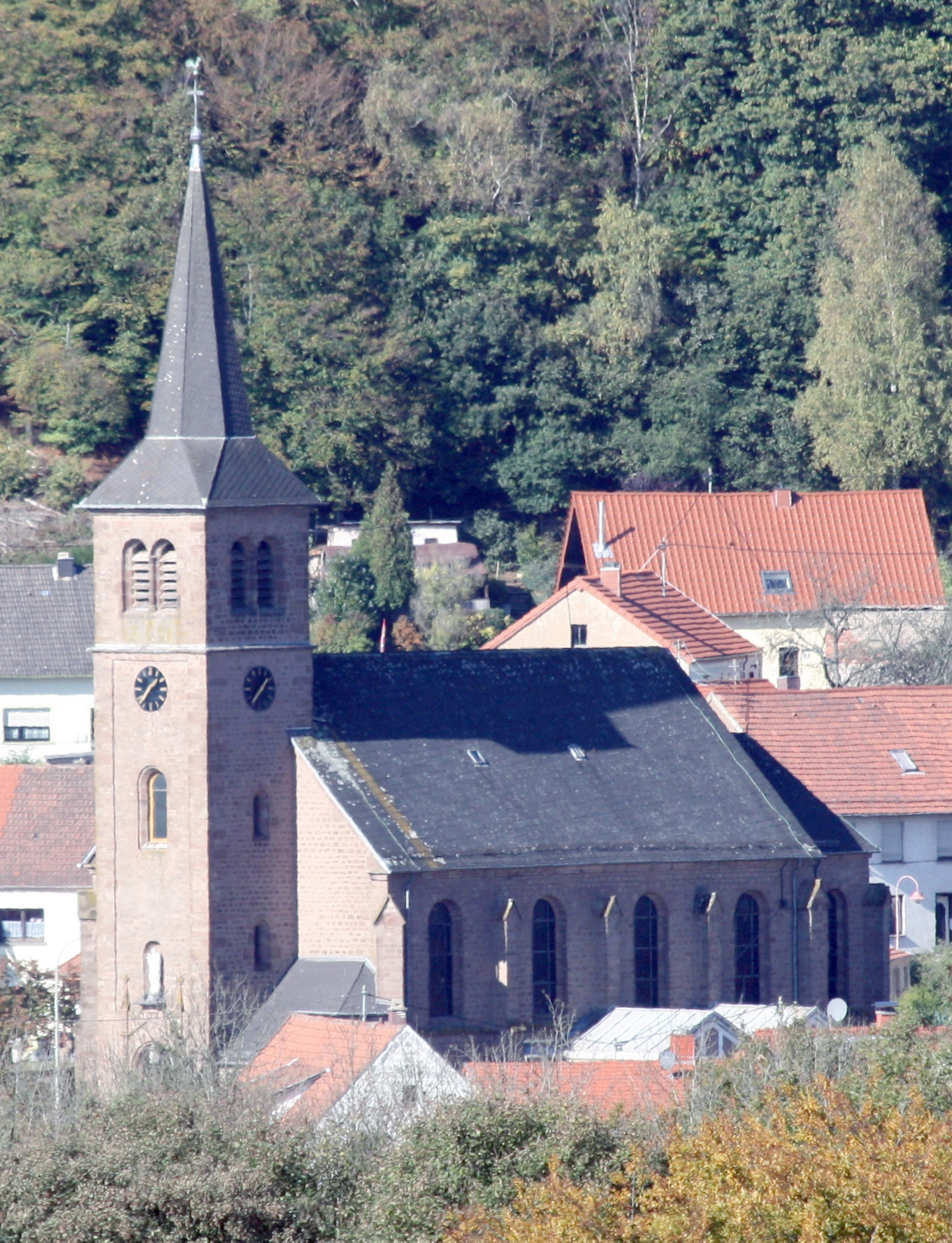 Ortskern von Namborn mit der Kirche Mariä Himmelfahrt. Blick von der Liebenburg aus.